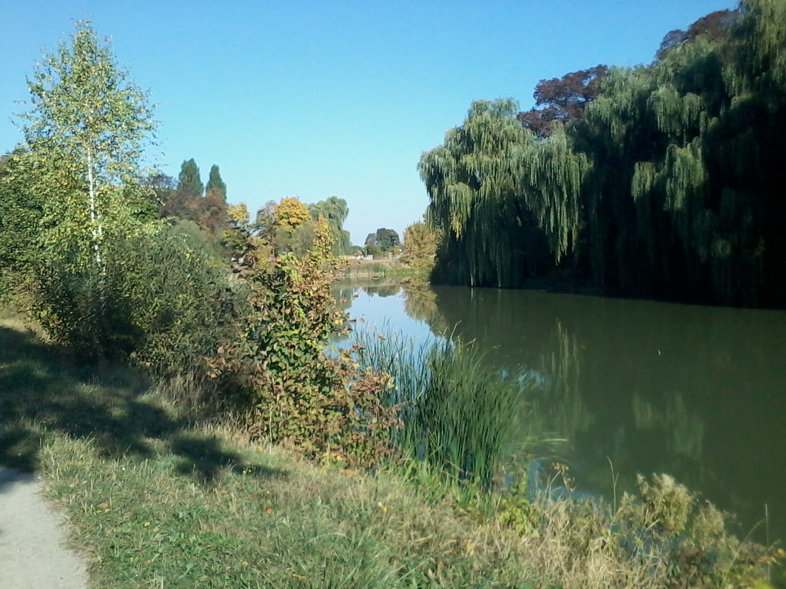 Графський парк Ніжин